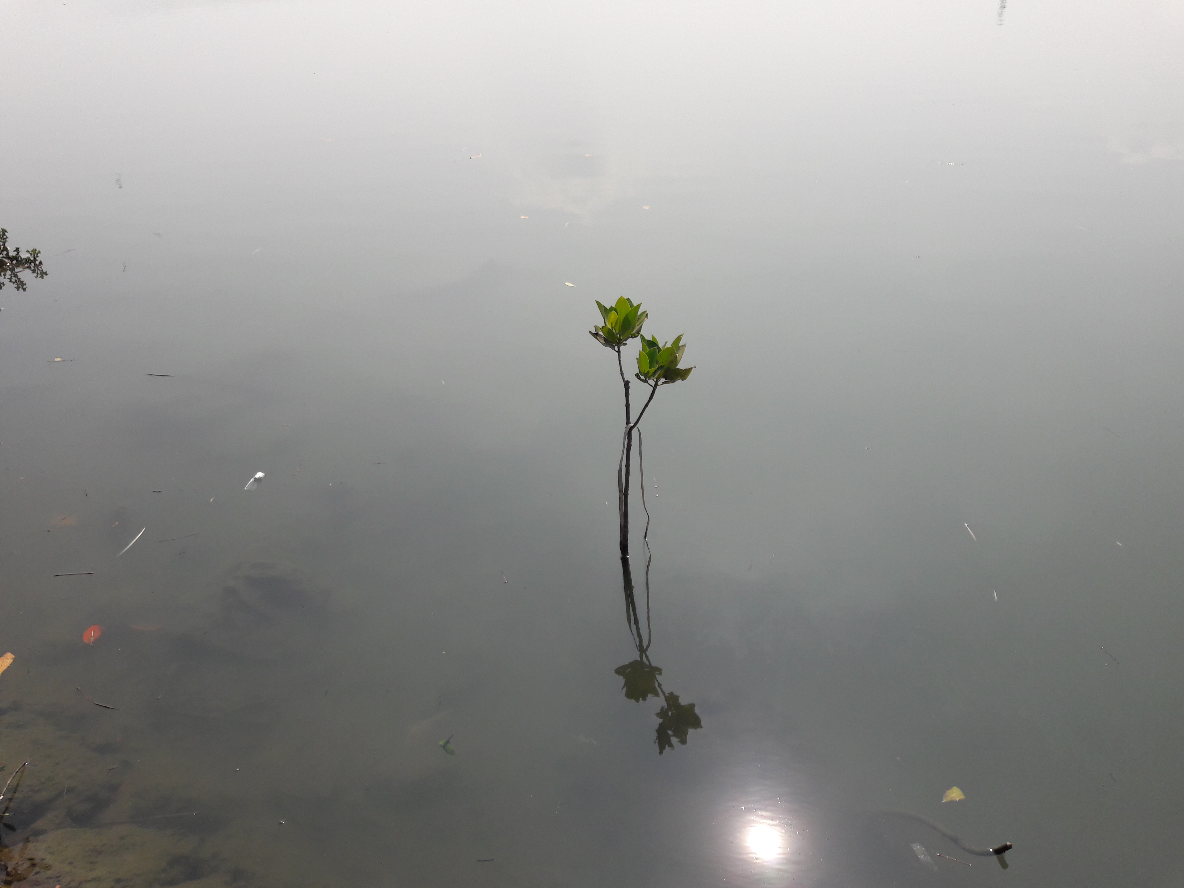 പ്രാന്തന്‍ കണ്ടല്‍ Loop-root mangrove ശാസ്ത്രീയ നാമം Rhizophora mucronata കുടുംബം Rhizophoraceae.